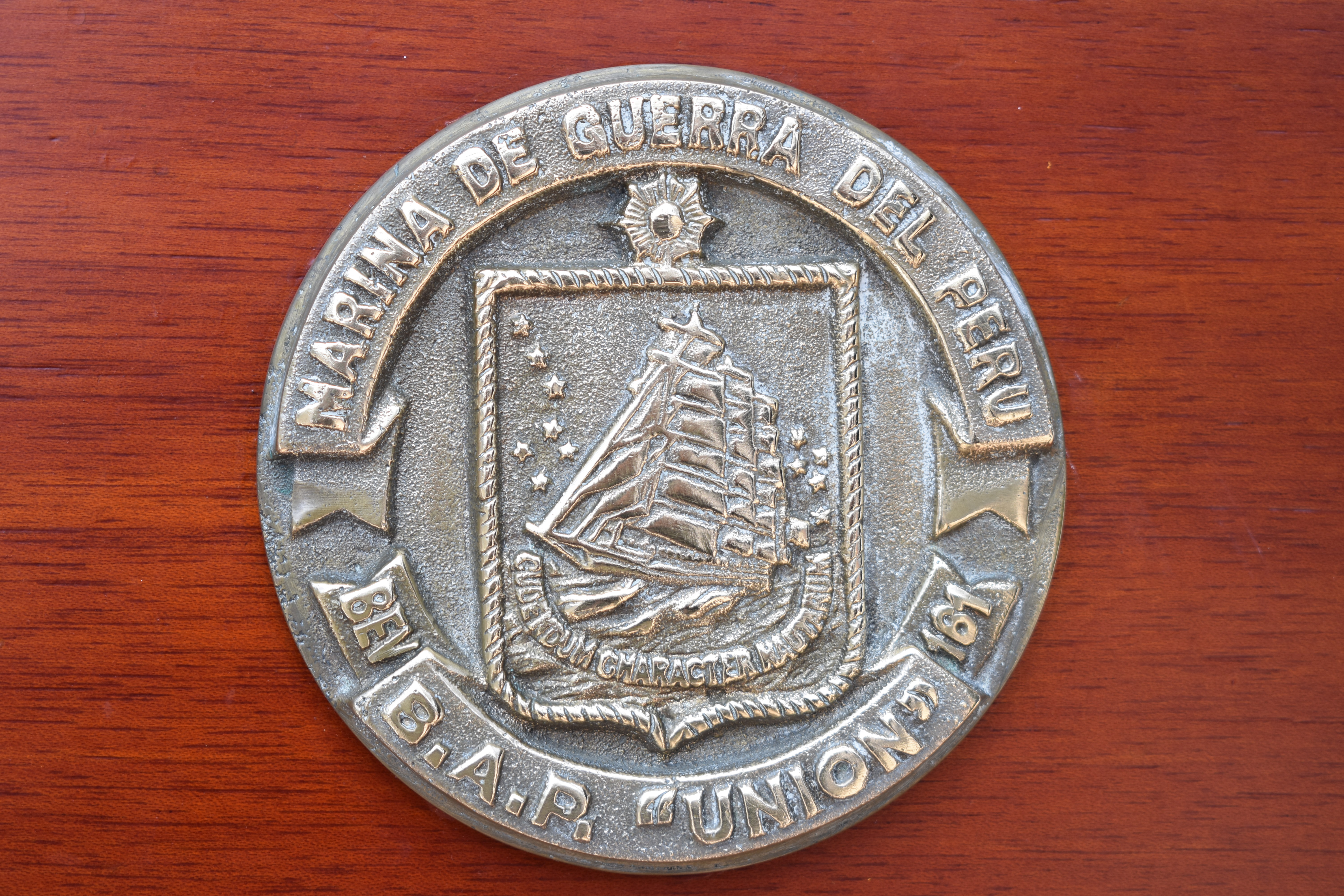 Escudo del BAP Unión colocado a bordo de la nave